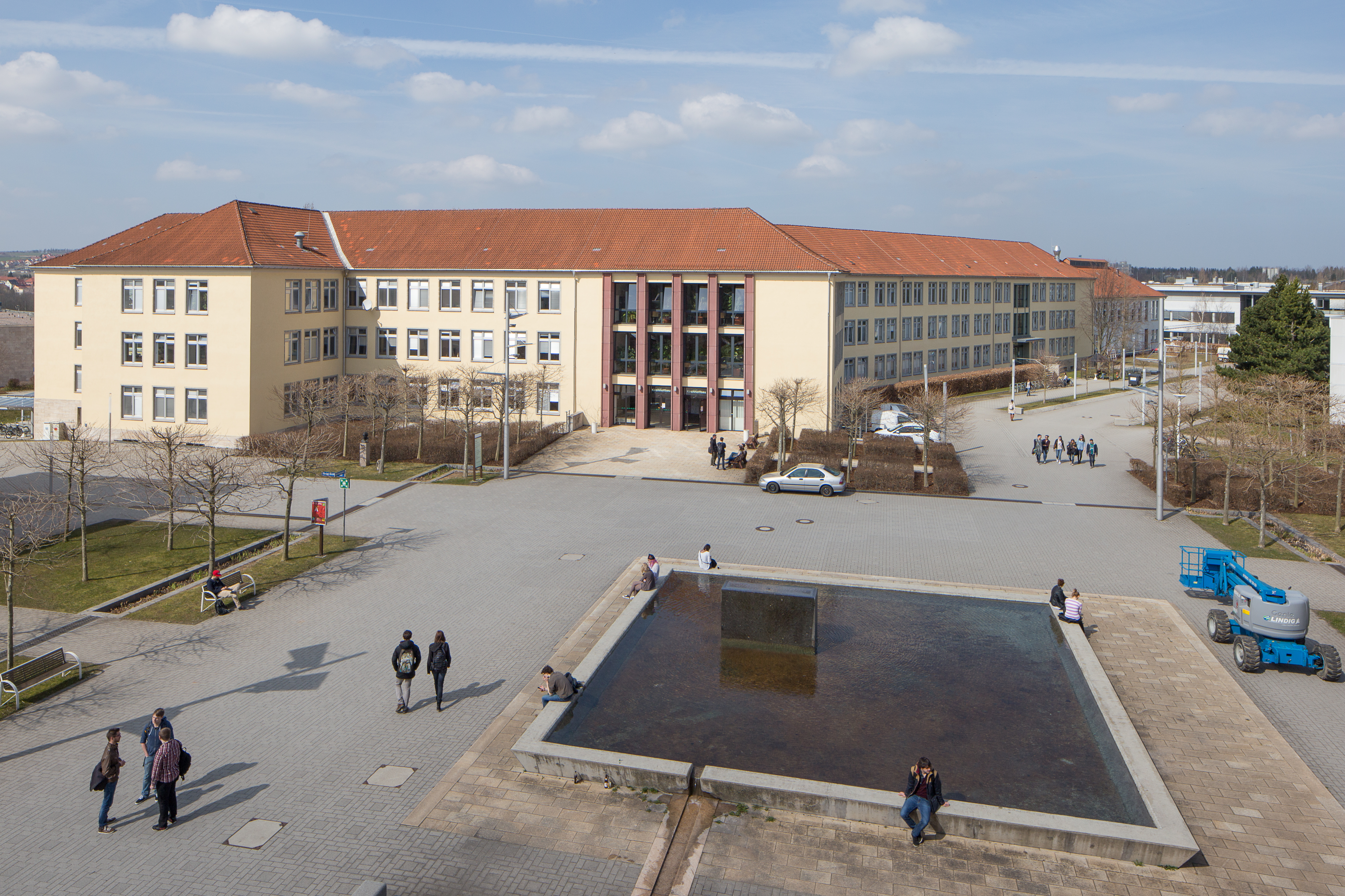 Gustav-Kirchhoff-Platz von Süden, TU Ilmenau Im Hintergrund der Kirchhoffbau